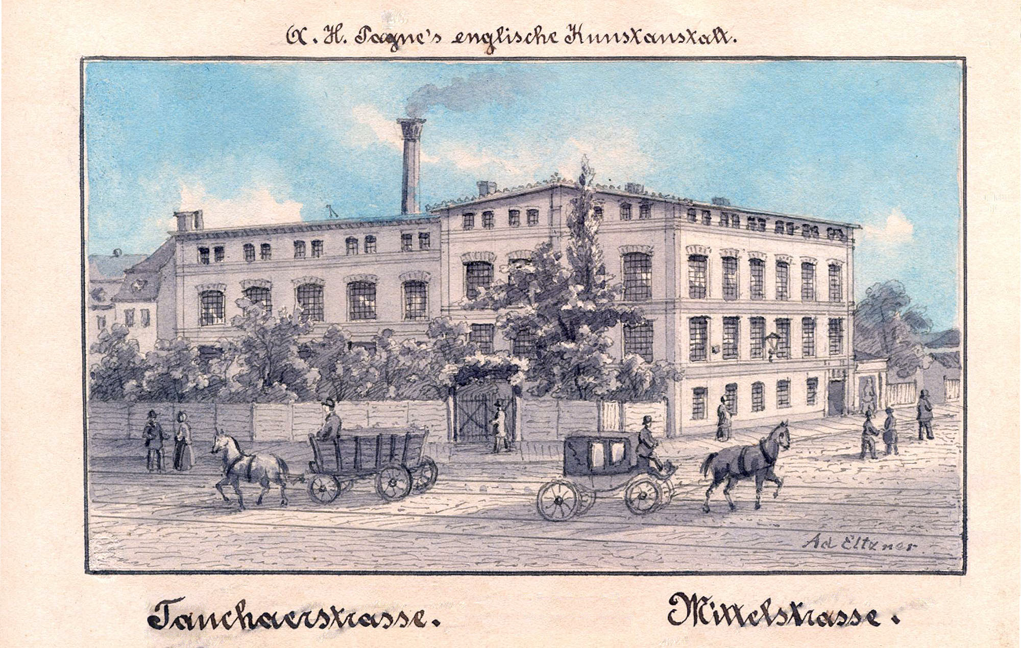 lavierte Federzeichnung